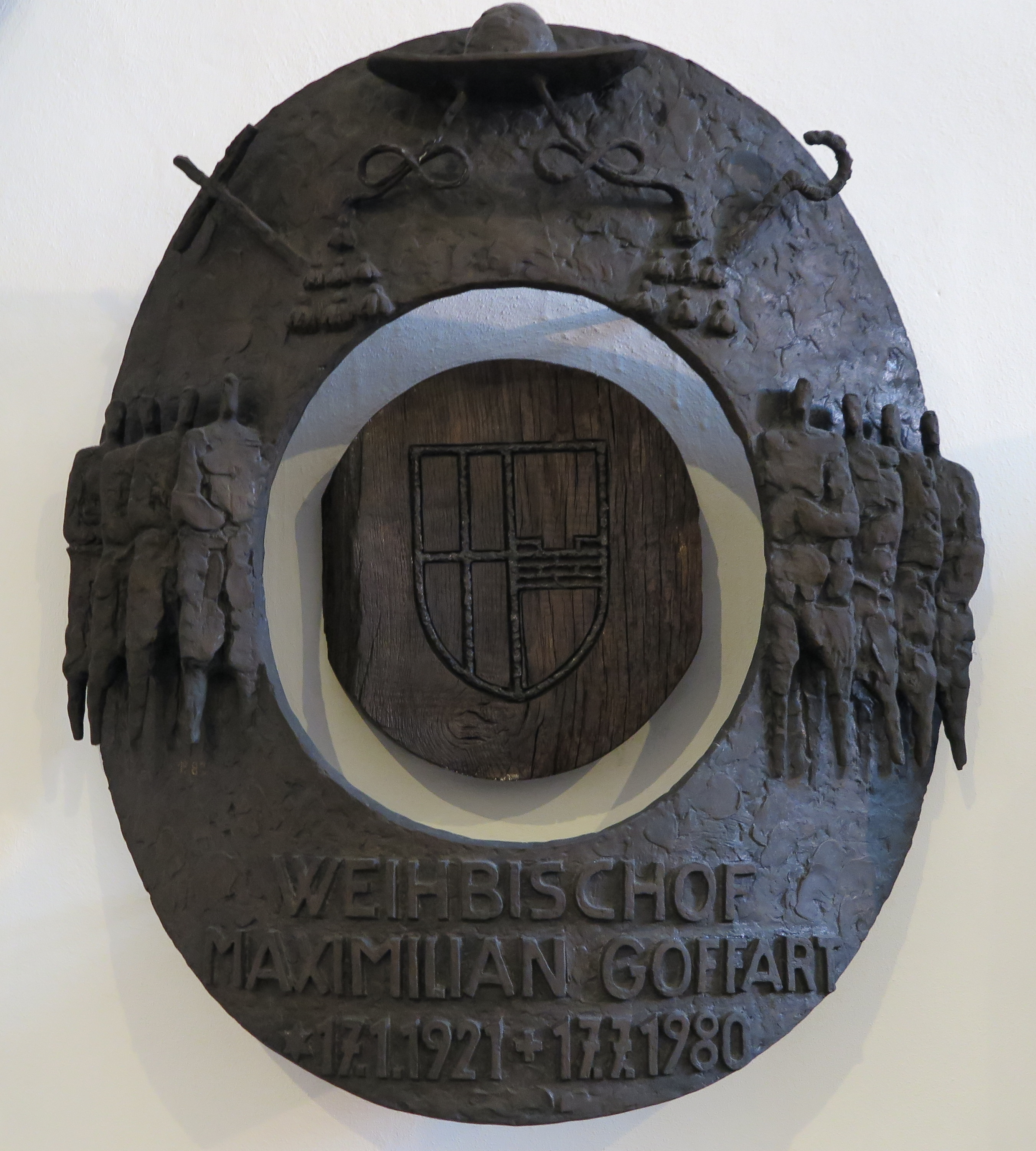 Gedenktafel an den Weihbischof des Aachener Bistums Maximilian Goffart in der Allerheiligenkapelle des Aachener Doms.